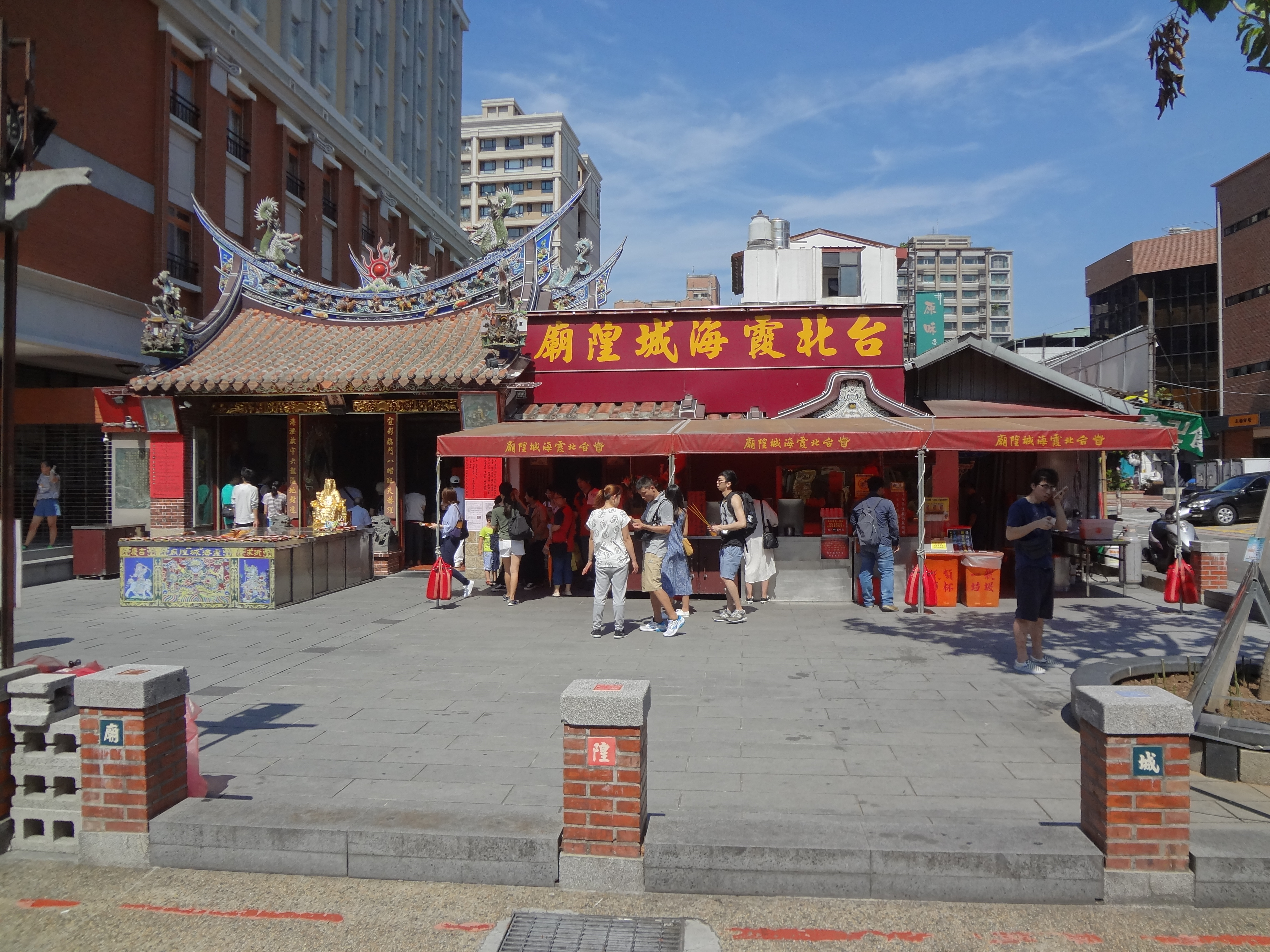 臺北霞海城隍廟正面。